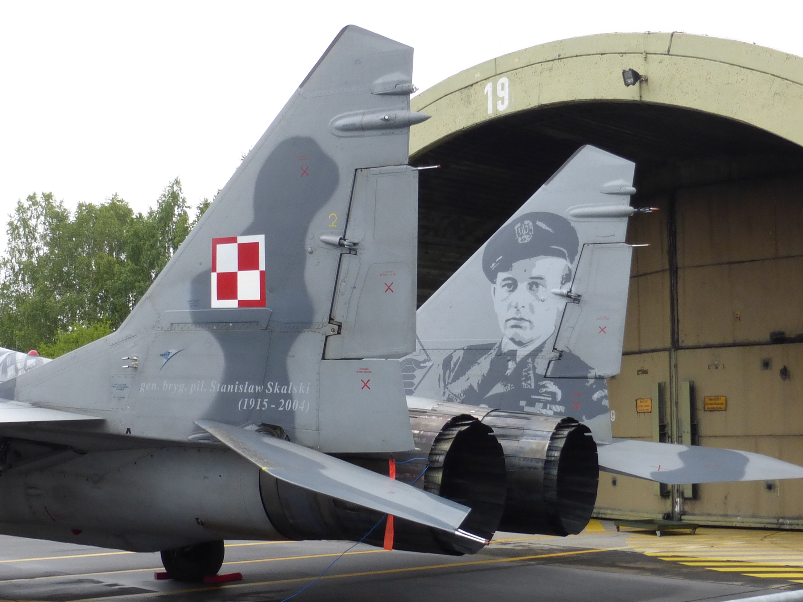 Stanislaw Skalski auf dem Seitenleitwerk einer polnischen MiG-29 am Tag der Bundeswehr 2016 in Neuburg an der Donau (Deutschland)